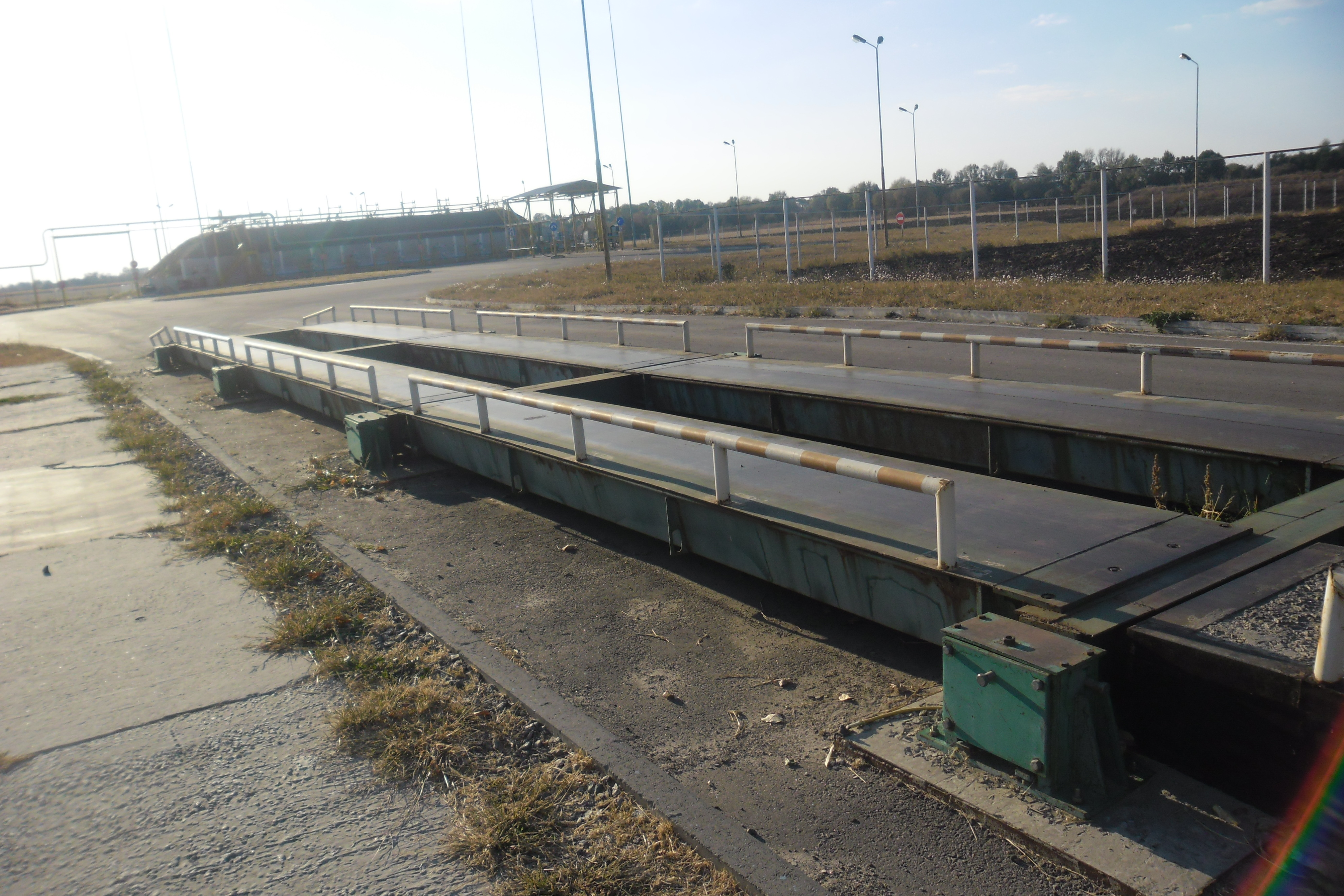 Автомобільні ваги